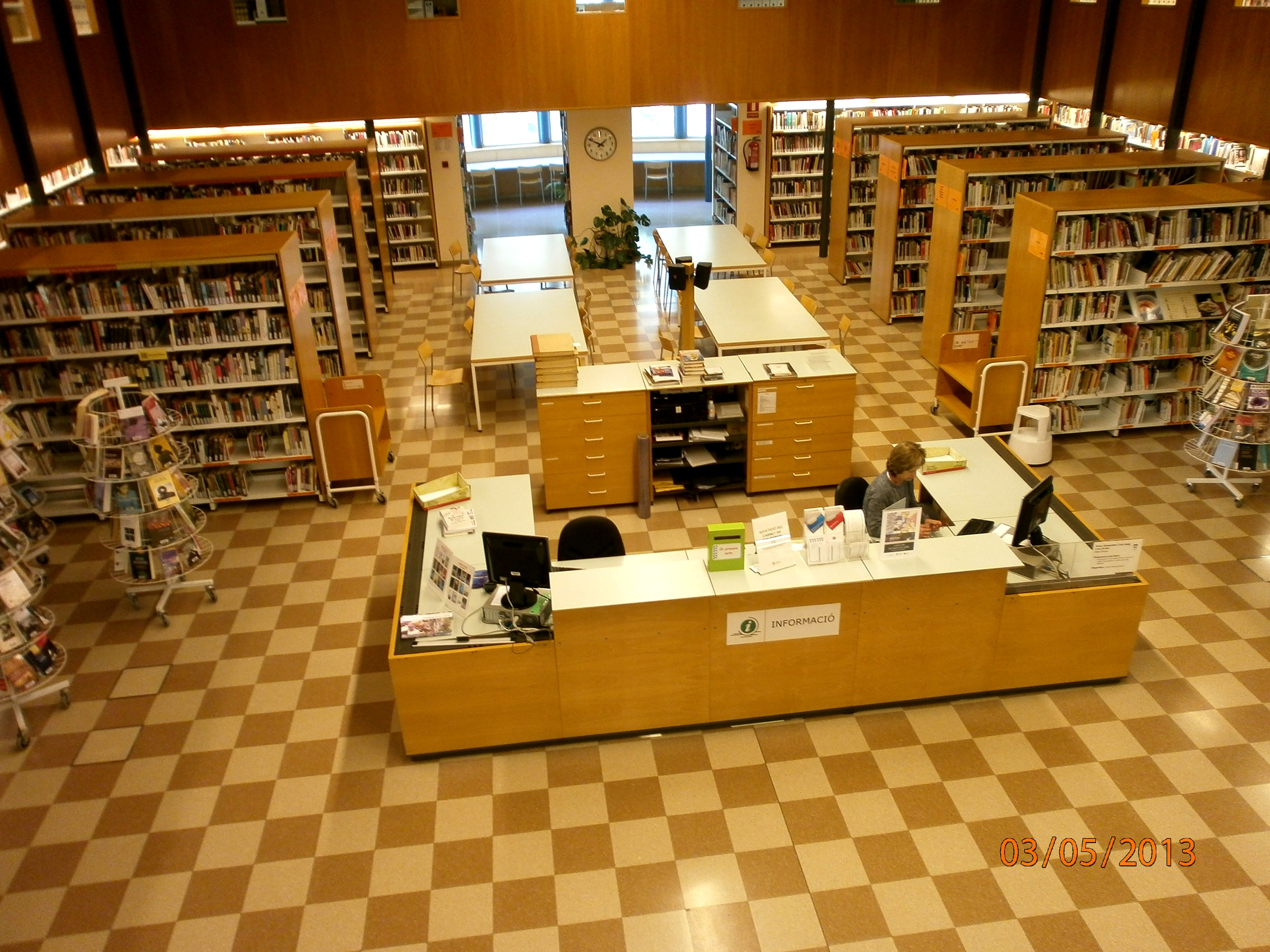 Salon central 4